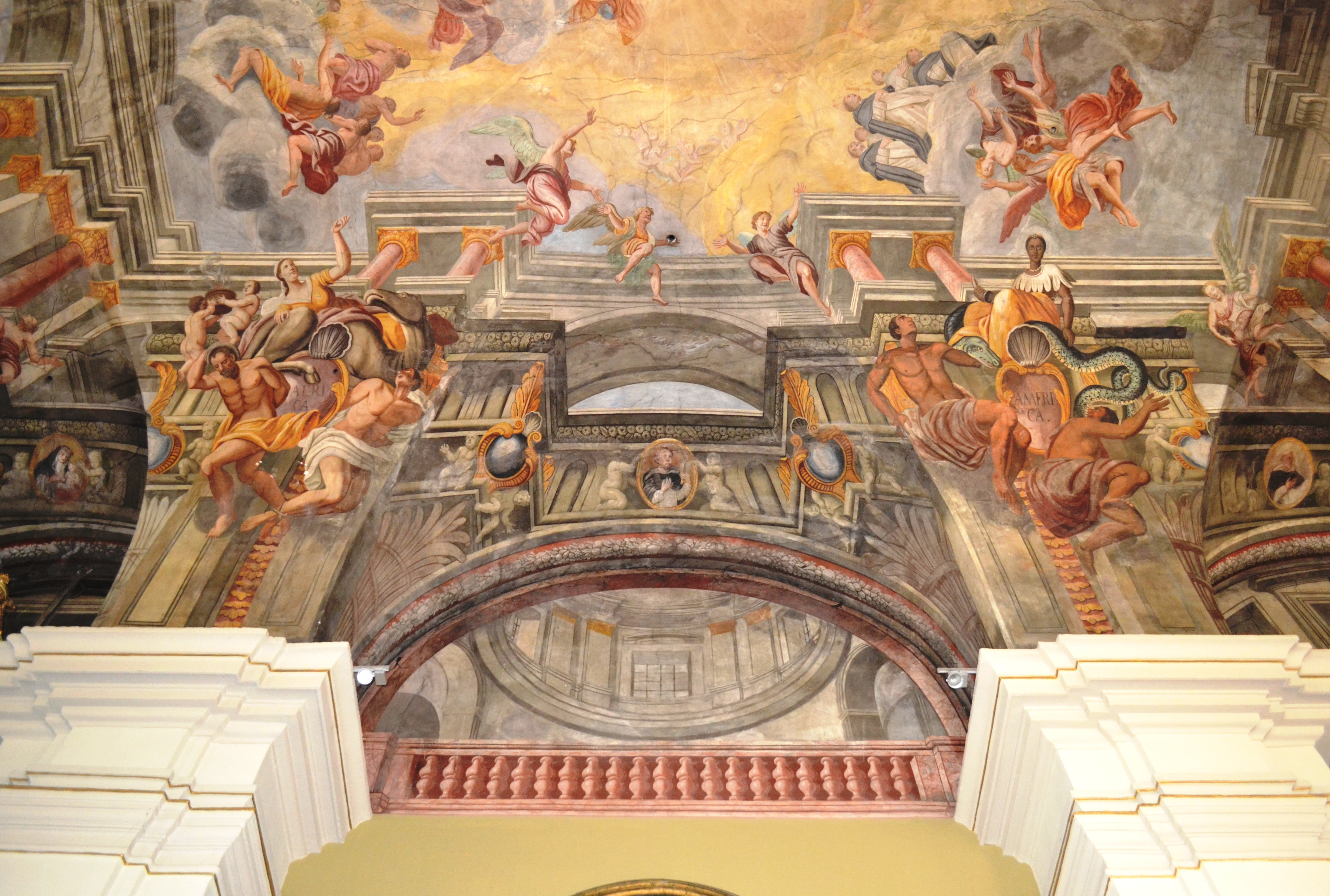 Maľby v kostole Nanebovzatia Panny Márie od košického maliara Štefana Vöröša pochádzajú z roku 1756. Kostol Nanebovzatia Panny Márie je najstaršou sakrálnou stavbou v Košiciach (koniec 13. stor.) Veľký požiar ho však v roku 1556 natoľko poškodil, že až do roku 1698 sa v ňom bohoslužby nekonali. V prvej polovici 18. storočia ho opravili a jeho vnútro čiastočne prestavali v barokovom slohu.